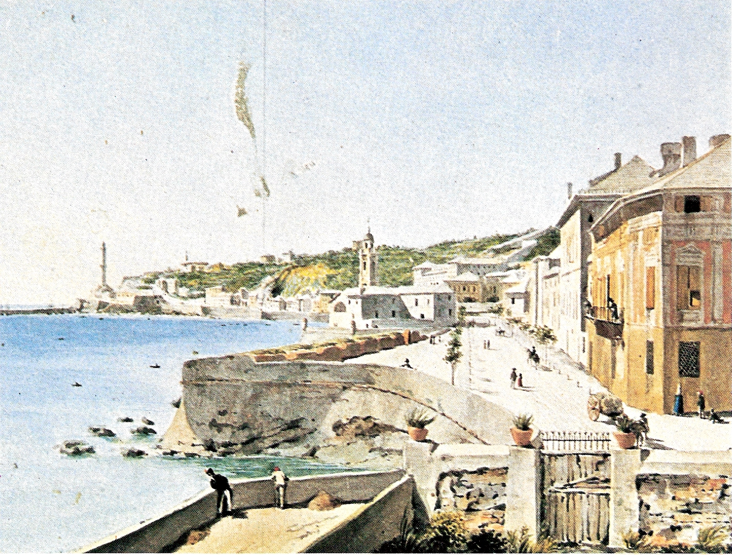 Dipinto di Luigi Garibbo raffigurante del porto di Genova verso la Lanterna, presa dai pressi di San Teodoro.